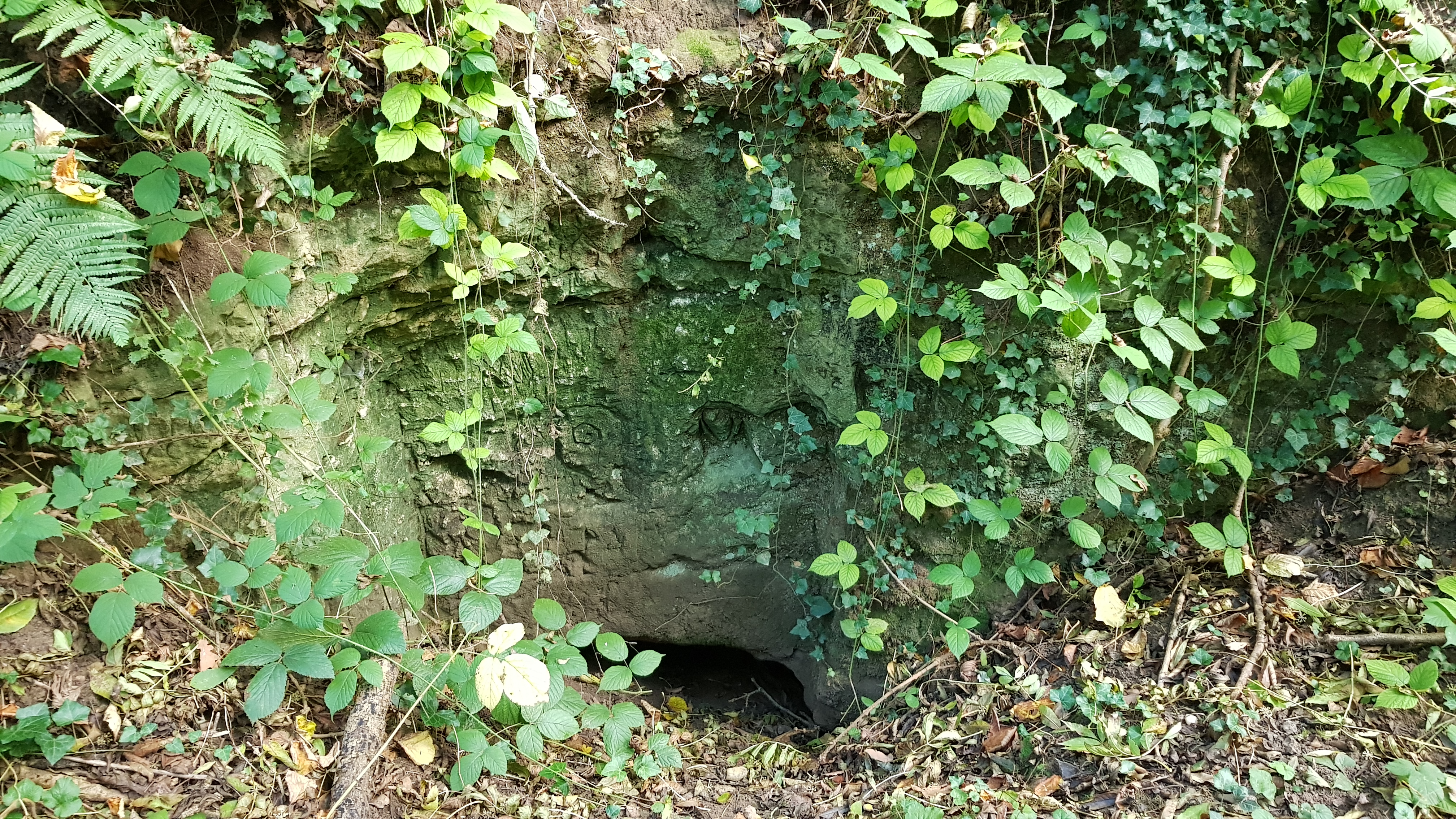 Groeve Scheggeldergrub II in Savelsbos, Eckelrade, Nederland